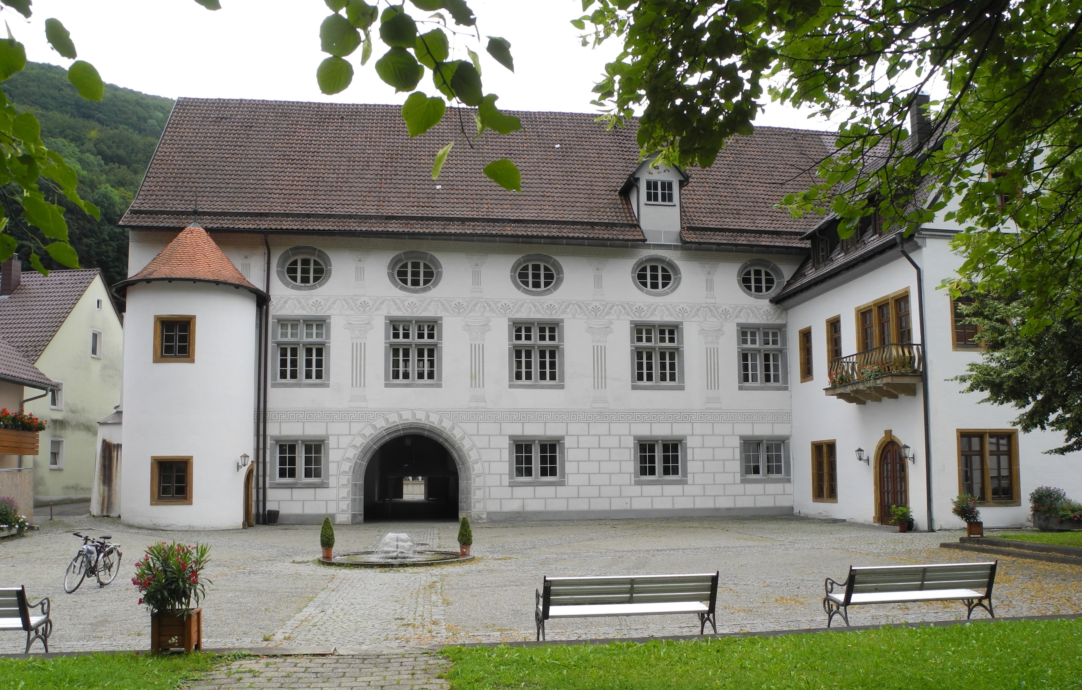 Wiesensteig - Residenzschloss der Helfensteiner (1551)_02